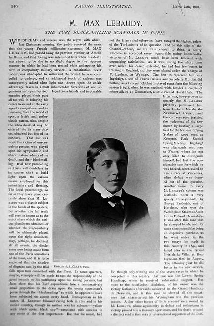 L'affaire Max Lebaudy et ses maîtres chanteurs liés au monde du turf, The Racing Illustrated, 25 mars 1896.